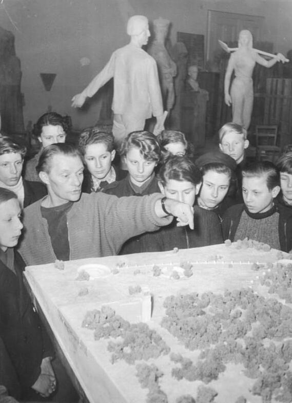 Berlin, Jugendstunde, Fritz Cremer Zentralbild Sturm Junge 3 Mot. 30.3.1955 Vorbereitung zur Jugendweihe Jugendliche besuchten Prof. Cremer Jugendliche aus der 7. Grundschule in Berlin-Pankow (Schulabgänger), die am 17. April 1955 an der Jugendweihe teilnehmen, besuchten am 23.3. den Bildhauer Nationalpreisträger Prof. Cremer in seinem Atelier. Prof. Cremer erklärte den Jugendlichen, wie eine Plastik entsteht und welches Material verwendet wird. U. B. z. Prof. Cremer mit Jugendlichen vor dem Modell der Buchenwald-Gedenkstätte.